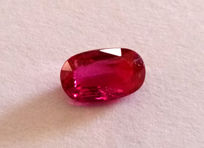 Rubin, 1.05ct, Mosambik